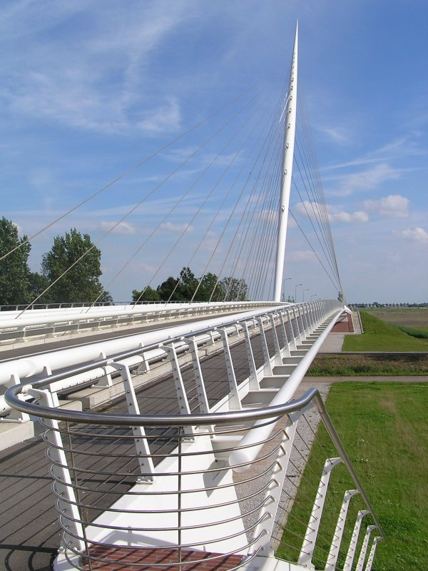 Description Brug ontworpen door Santiago Calatrava, genaamd Harp. Foto augustus 2005.Source Own workAuthor RonaldPermission(Reusing this file) eigen werk Brug ontworpen door Santiago Calatrava, genaamd Harp. Foto augustus 2005.